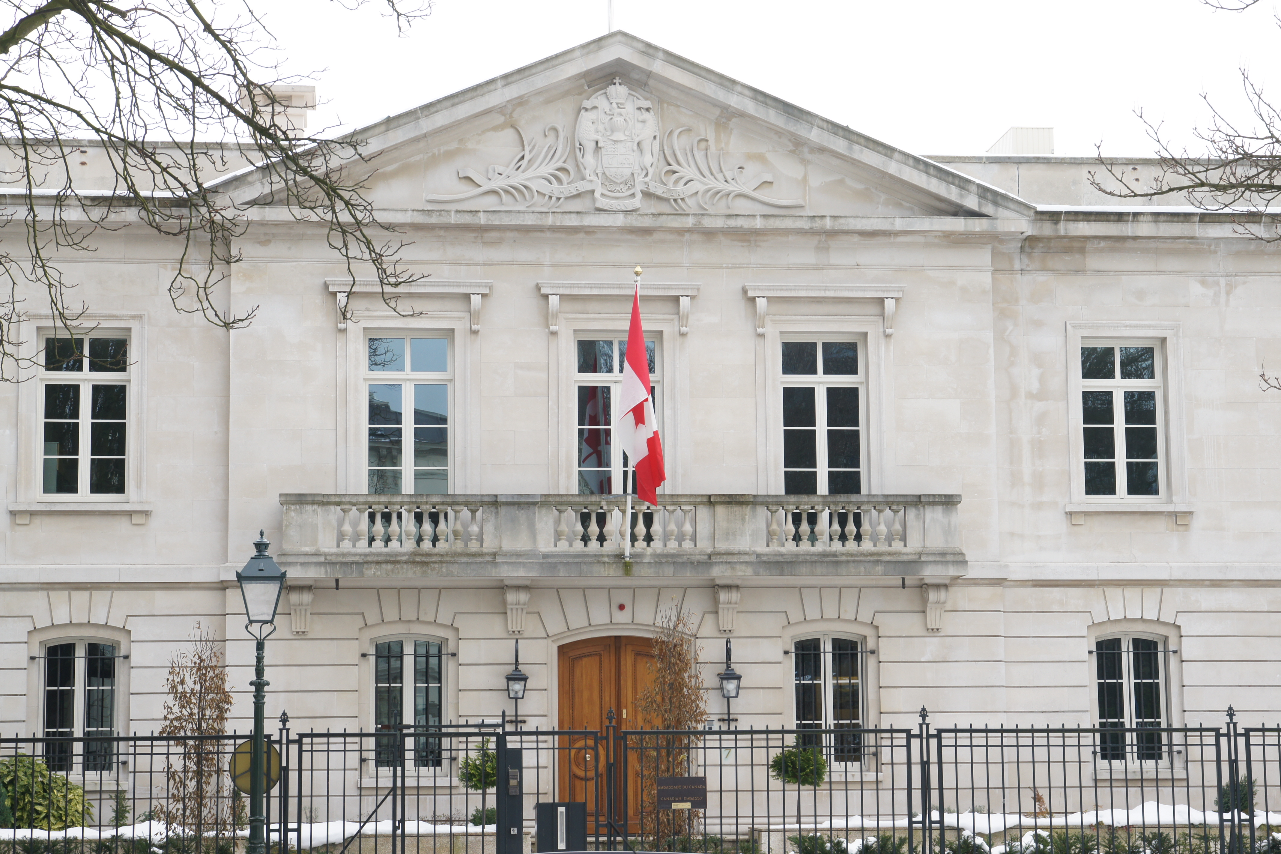 Canadian embassy